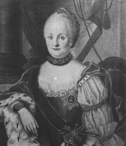 Ulrike Friederike Wilhelmine von Hessen-Kassel (1722-1787), Gemahlin des Bischofs Friedrich August